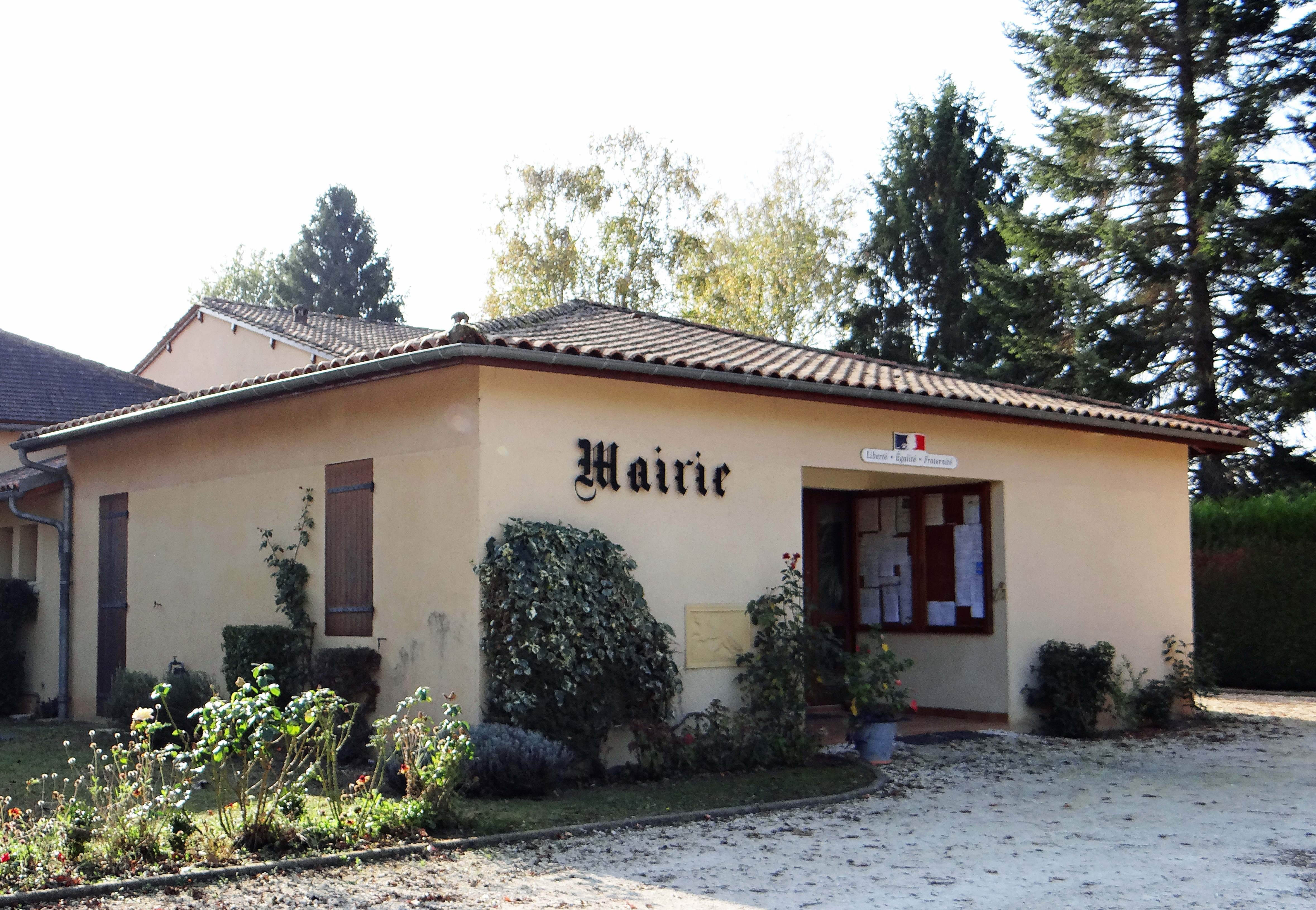 Marsalès (Dordogne) - Mairie